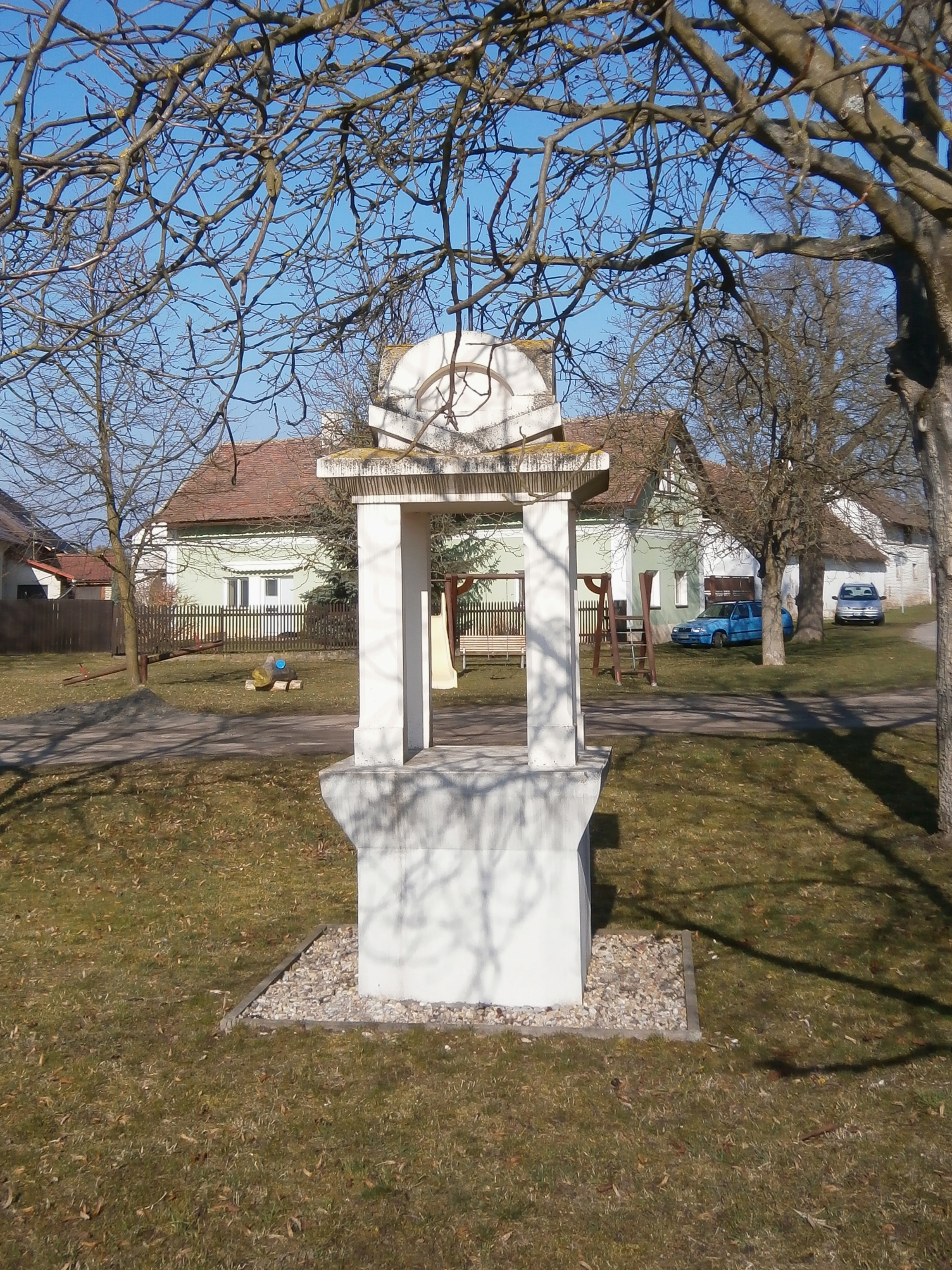 Kaplička (Vlčkovice)